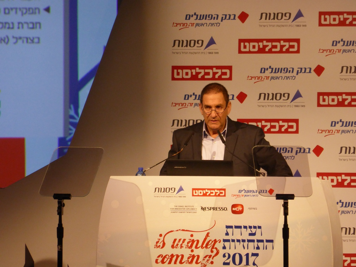 Yiftah Ron-Tal in Tel Aviv, 28 December 2016.